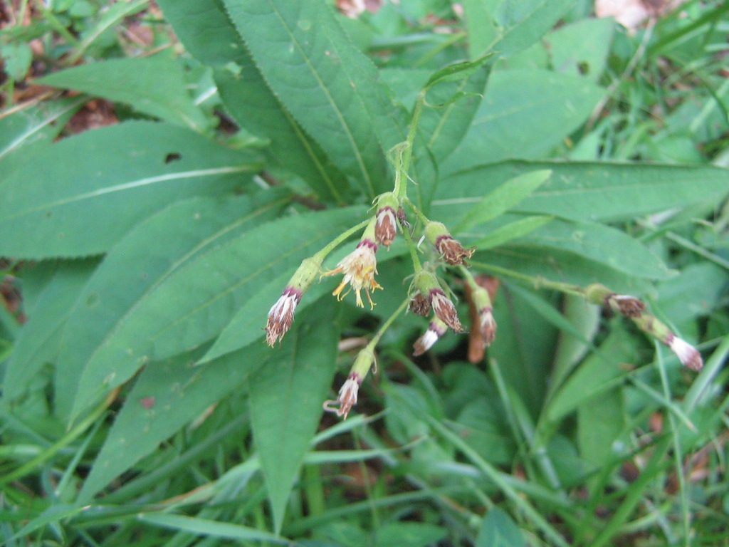 Séneçon cacaliaster (Monts d'Aubrac - France)